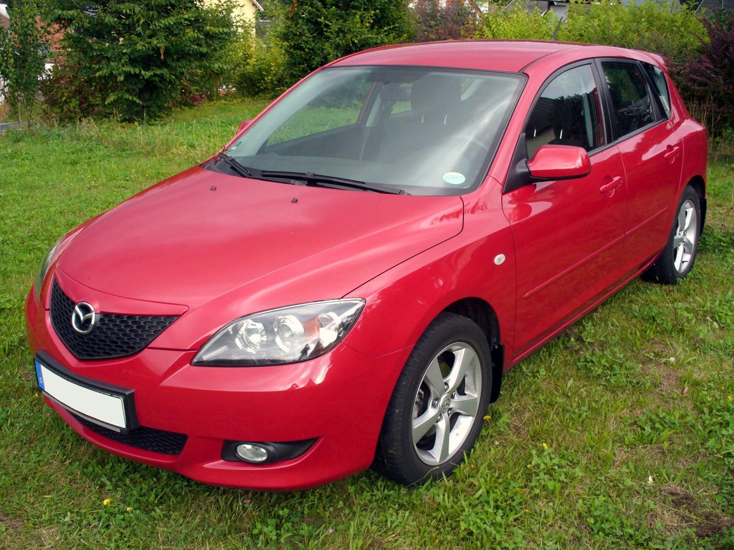 Mazda 3 Sport